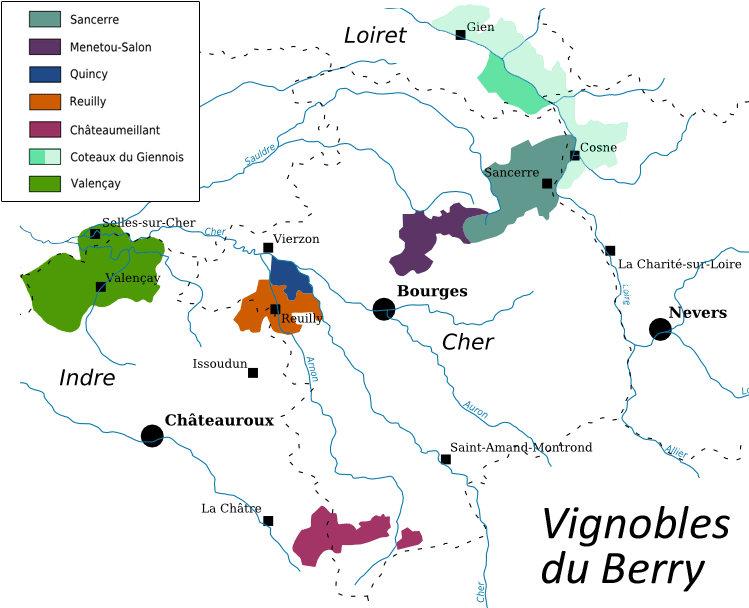 Les régions viticoles du Berry